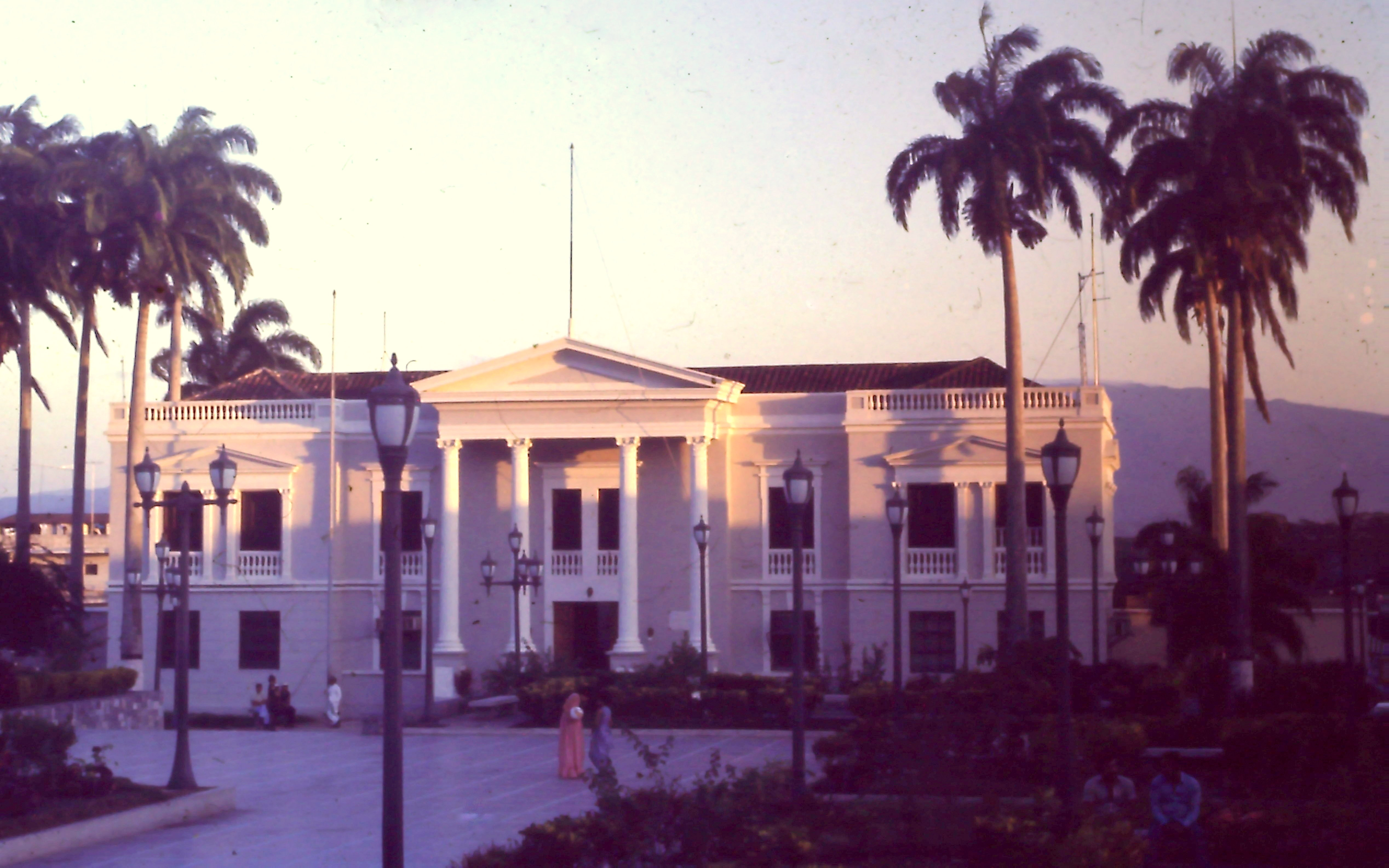 Plaza Bolívar en San Felipe, Carnaval 1977